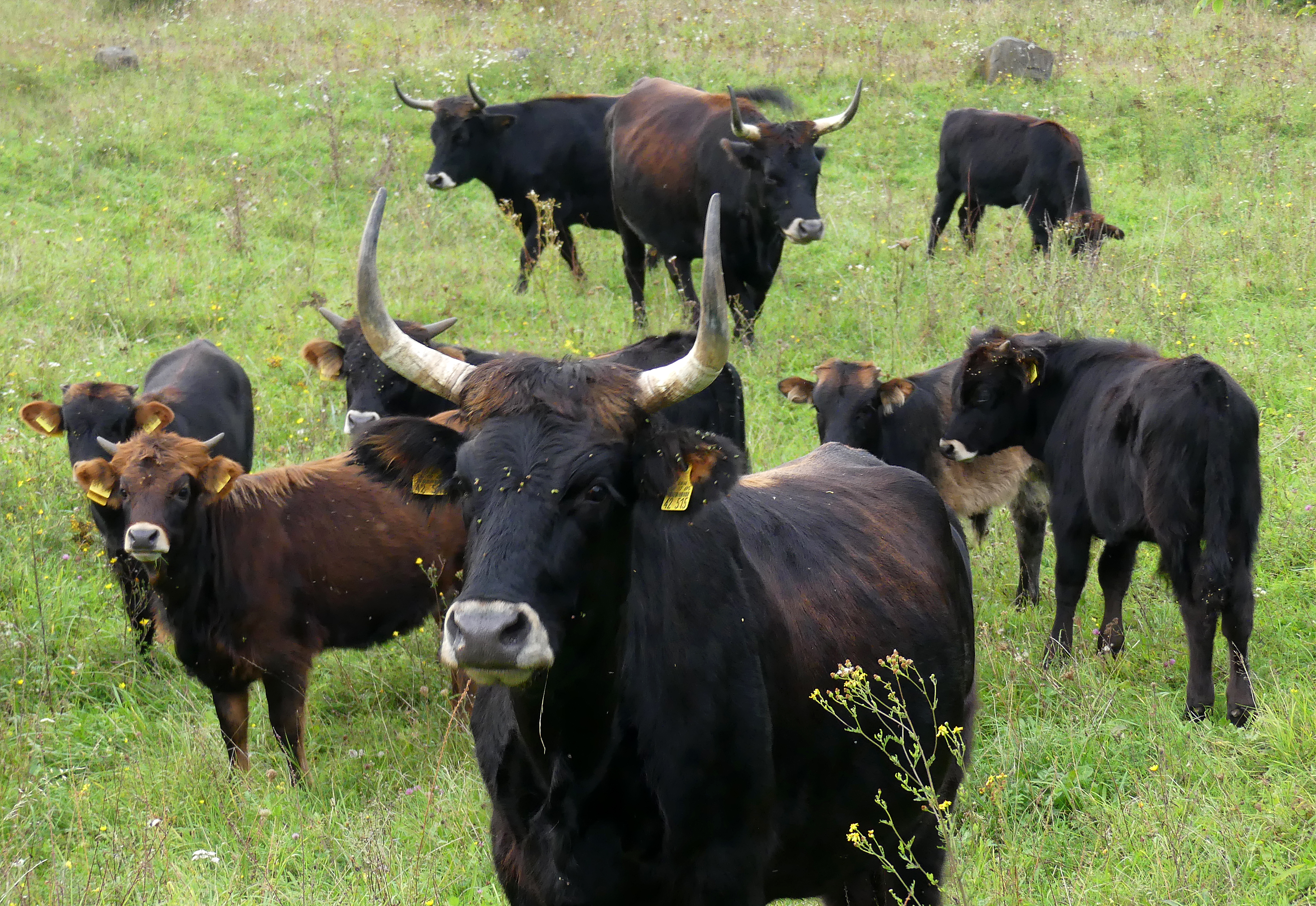 Auf der Schmidtenhöhe werden robuste Taurusrinder (und Konik-Pferde) als wirkungsvolle Gegenmaßnahme zur fortschreitenden Verbuschung vom NABU eingestetzt, der für 235 Hektar verantwortlich ist. Ziel ist eine artenreiche halboffene Weidelandschaft.